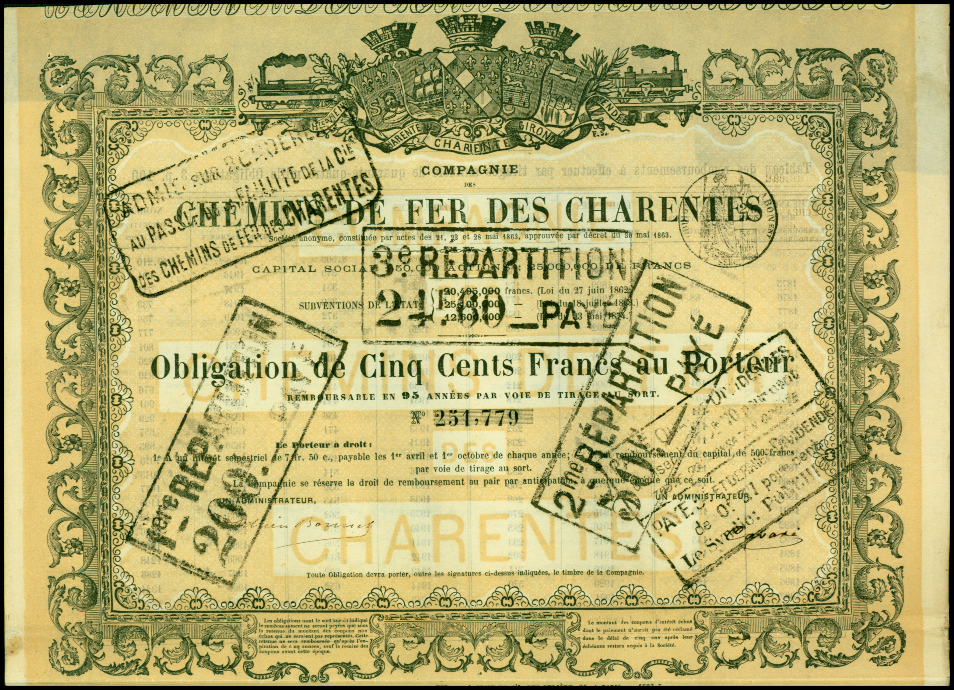 Obligation über 500 Francs der Compagnie des Chemins de Fer des Charentes von 1875